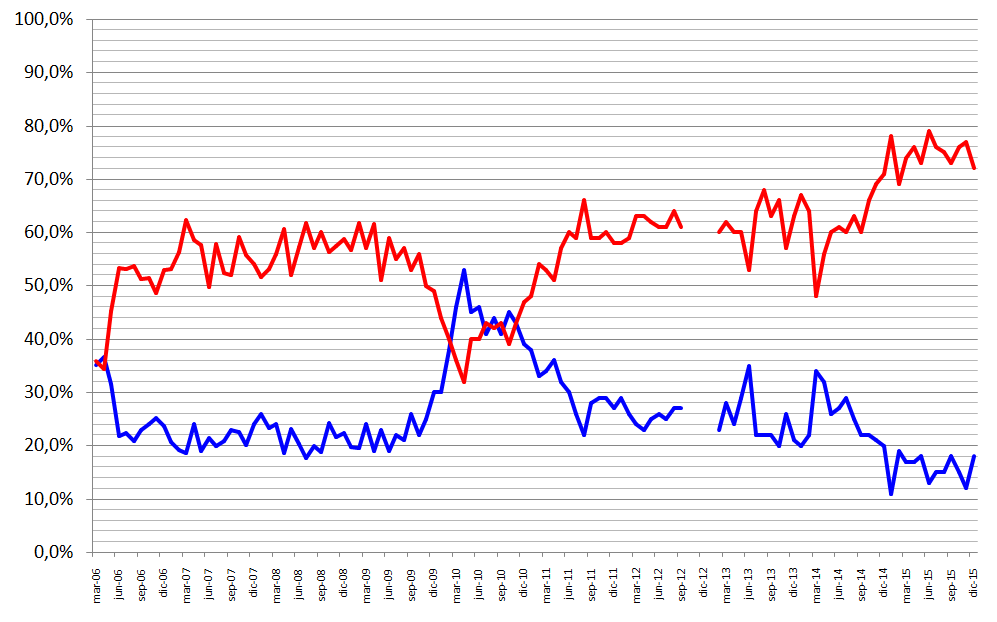 Porcentajes de aprobación (línea azul) y rechazo (línea roja) de la Alianza (Chile). Información encuesta Adimark ( desde marzo de 2006 en adelante.